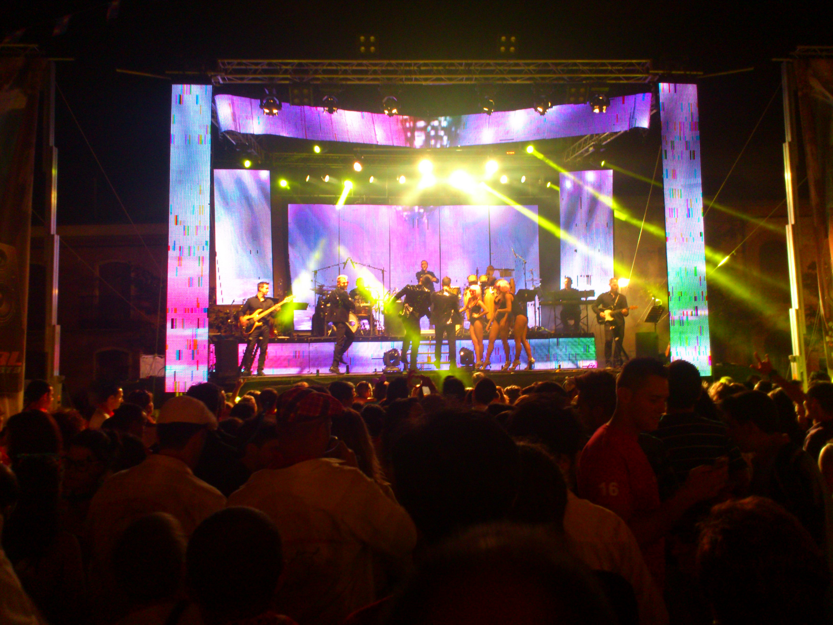 Concierto de la 'Orquesta La Mundial' en la Plaza Mayor de Pedrajas de San Esteban (Valladolid). Fiestas de San Agustín del año 2014.